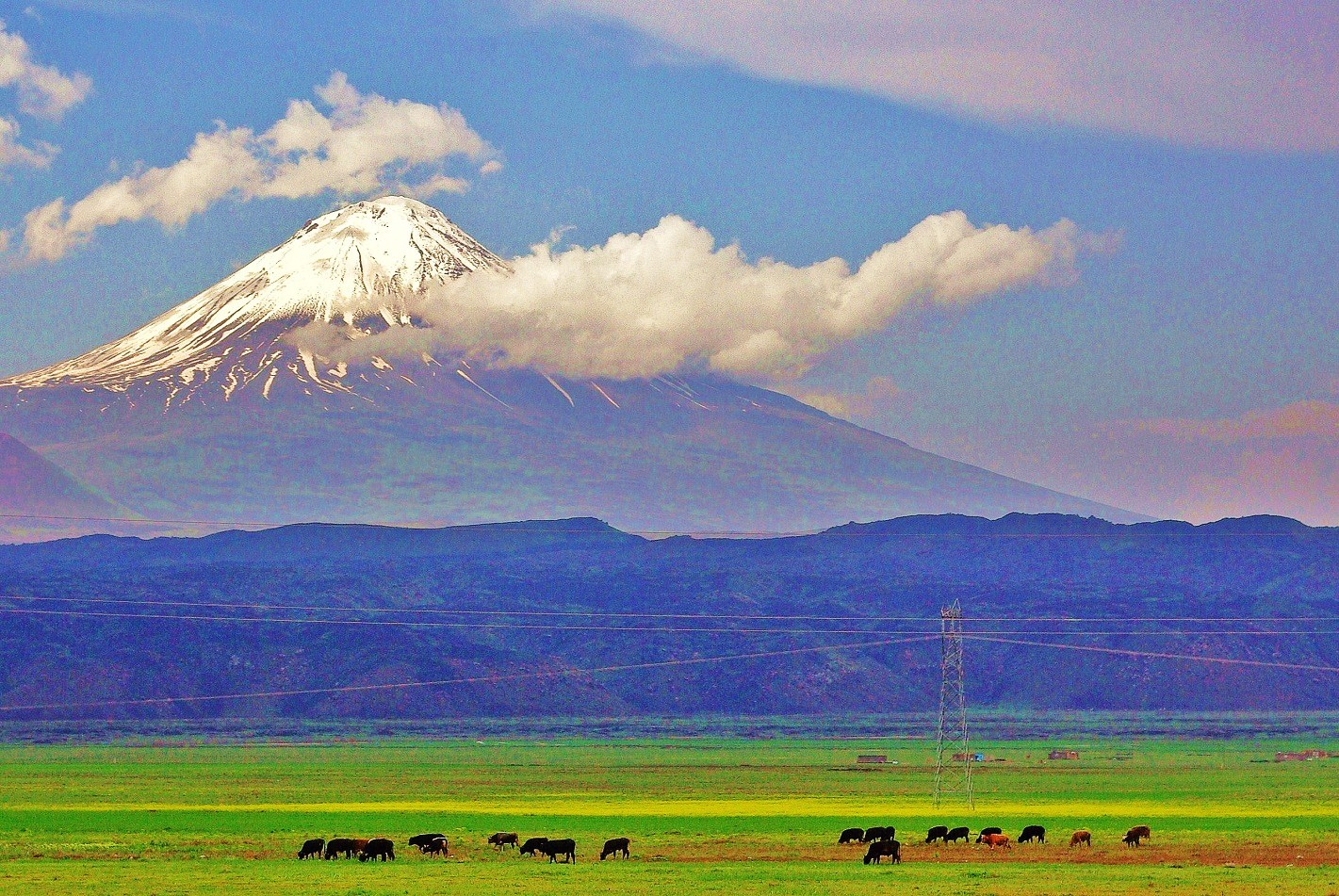 Küçük Ağrı Dağı